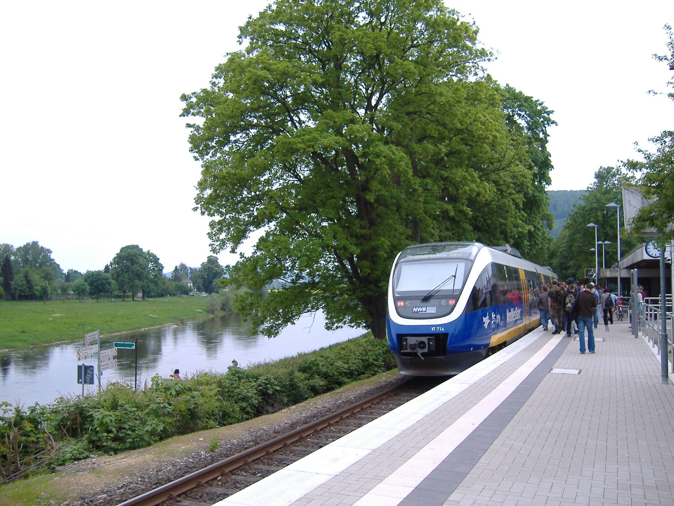 Haltepunkt Höxter, Rathaus 2006; Regionalbahn der Nord-West-Bahn nach Holzminden